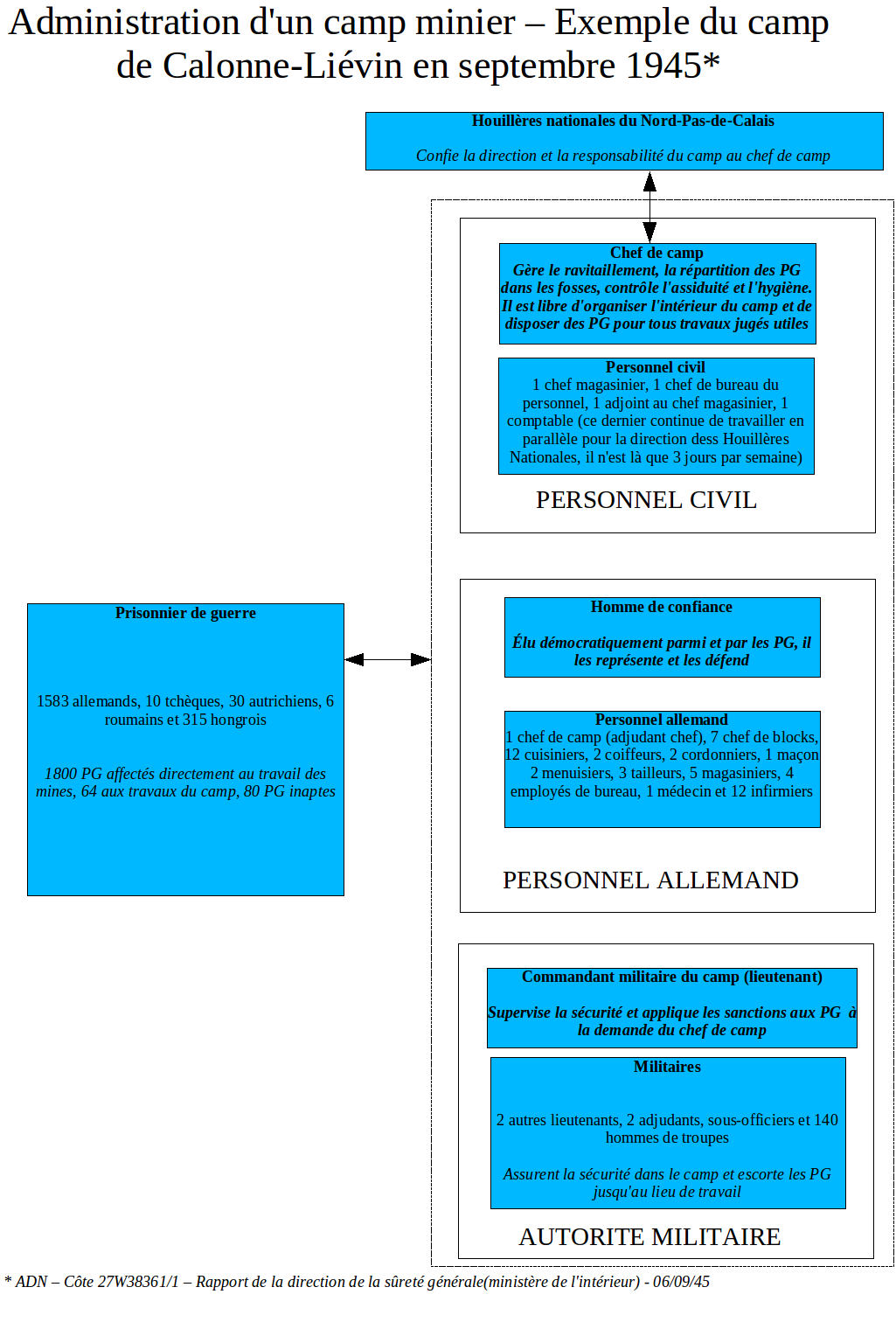 Source : archives départementales du Nord (France)